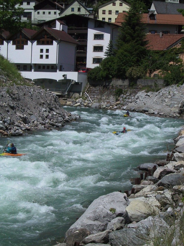 Die Sanna bei Pians - Pianner Schwall